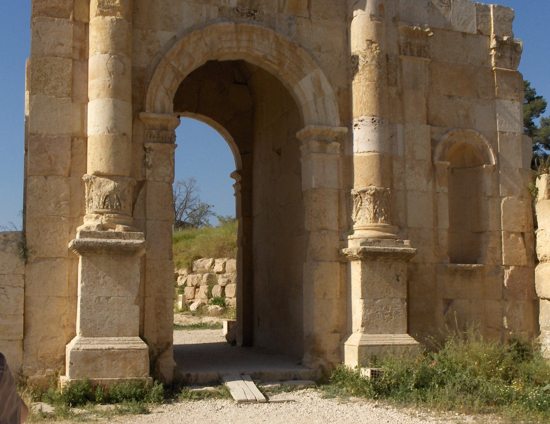 La porta meridionale di Jerash, Giordania